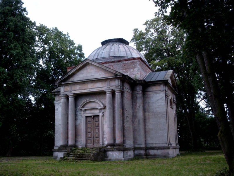 Mausoleum, Familien-Gruft der Grafen Henckel von Donnersmarck im Schloss Polnisch Krawarn